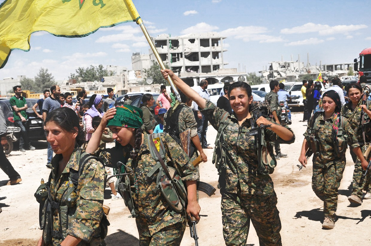 YPG